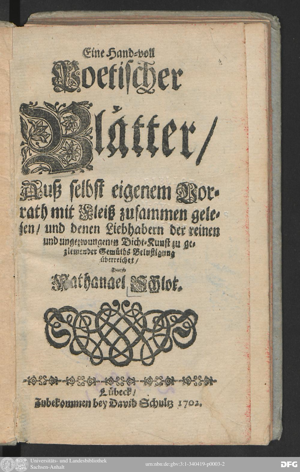 Titel des Buches "Eine Hand-voll poetischer Blätter, auss selbst eigenem Vorrath mit Fleiss ... von Nathanael Schlott erschienen 1702 in Lübeck